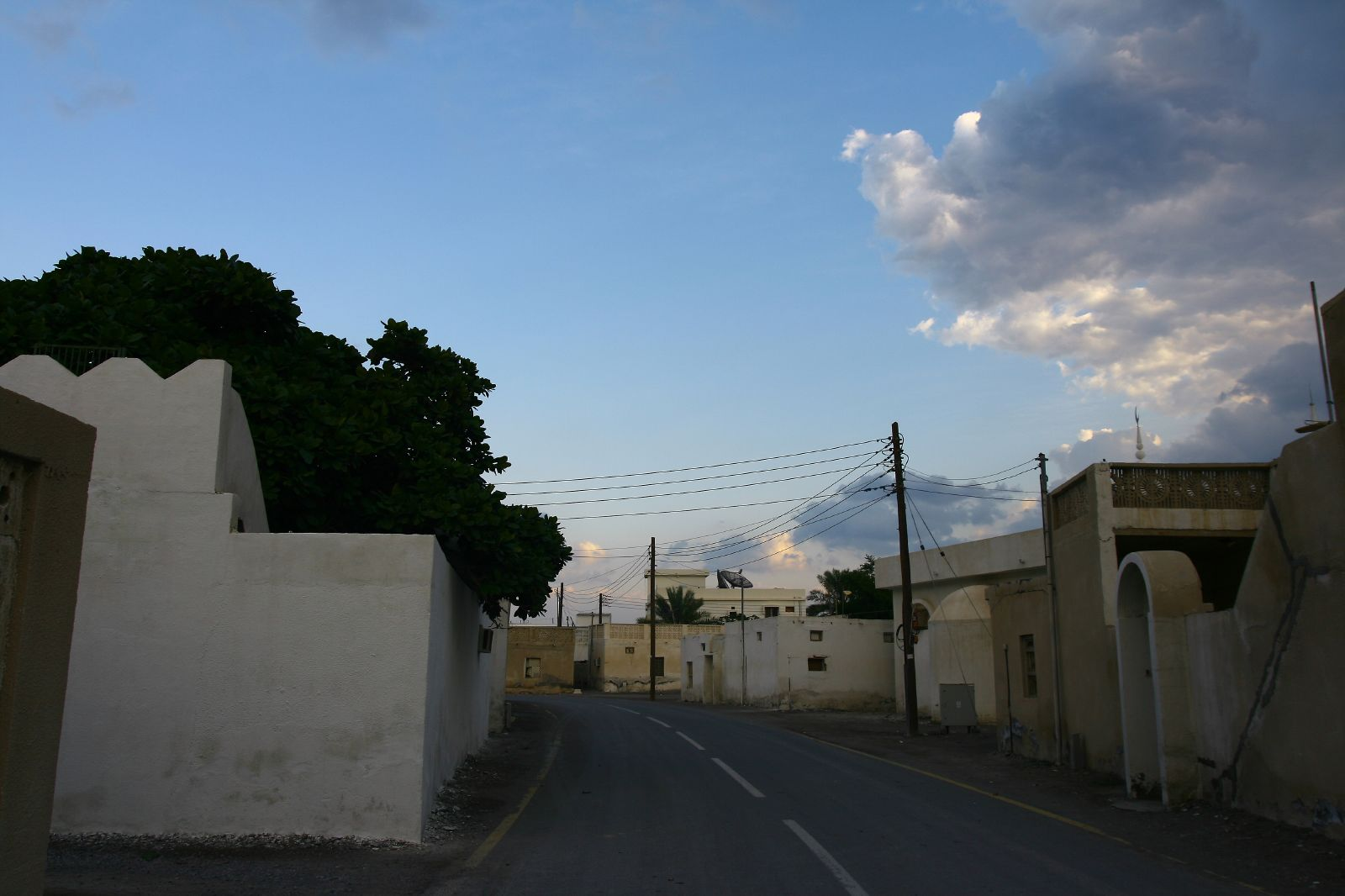 Fotografie z Chasabu.